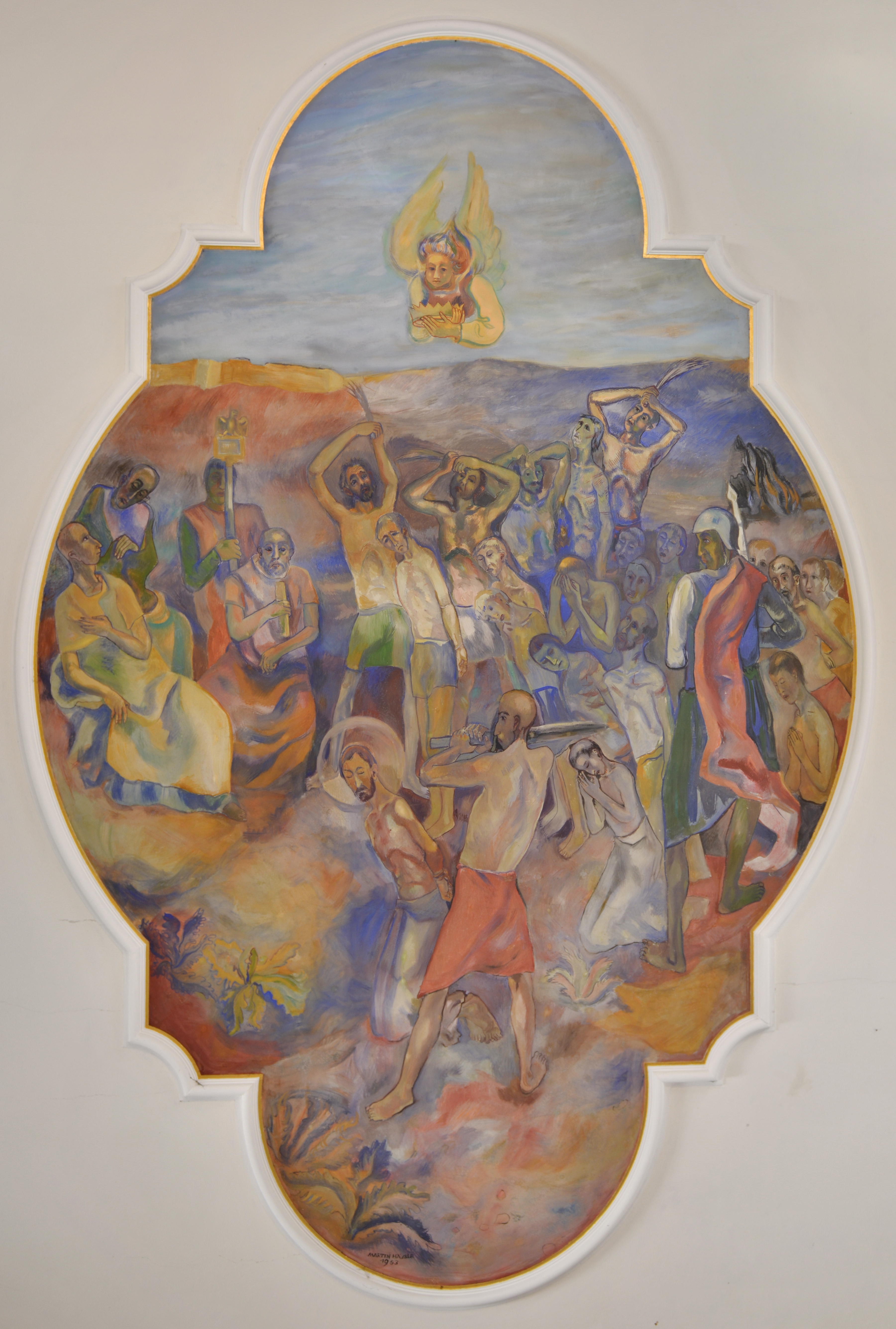 Alte Pfarrkirche Hll. Cornelius und Cyprian, in Tosters bei Feldkirch in Vorarlberg.